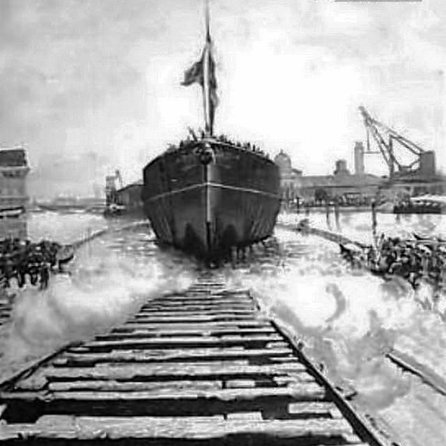 La corazzata RN Sicilia al momento del varo nell'Arsenale di Venezia